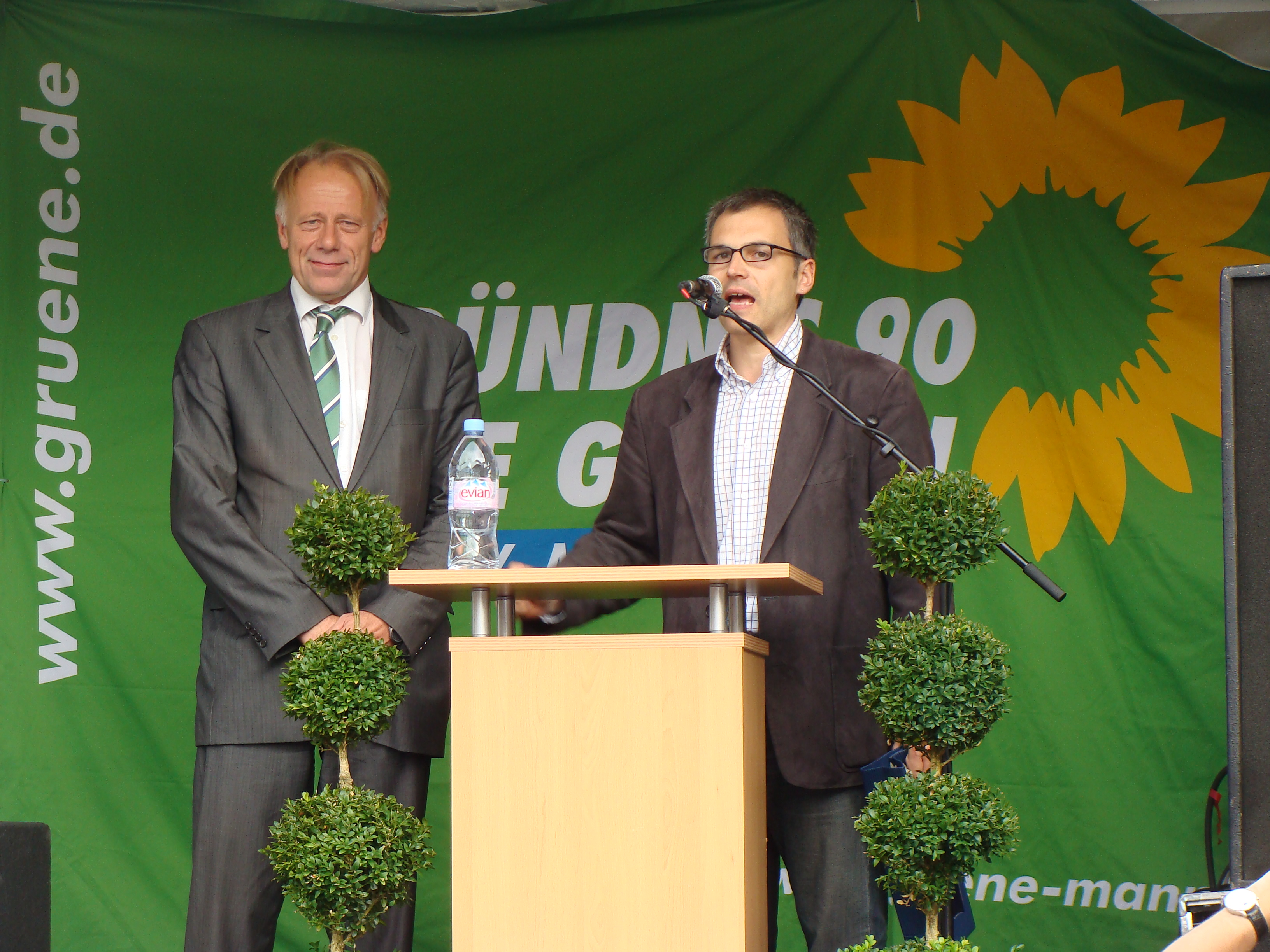 Gerhard Schick (MdB aus Mannheim) und Trittin auf dem Podium. Wahlkampfveranstaltung in Mannheim